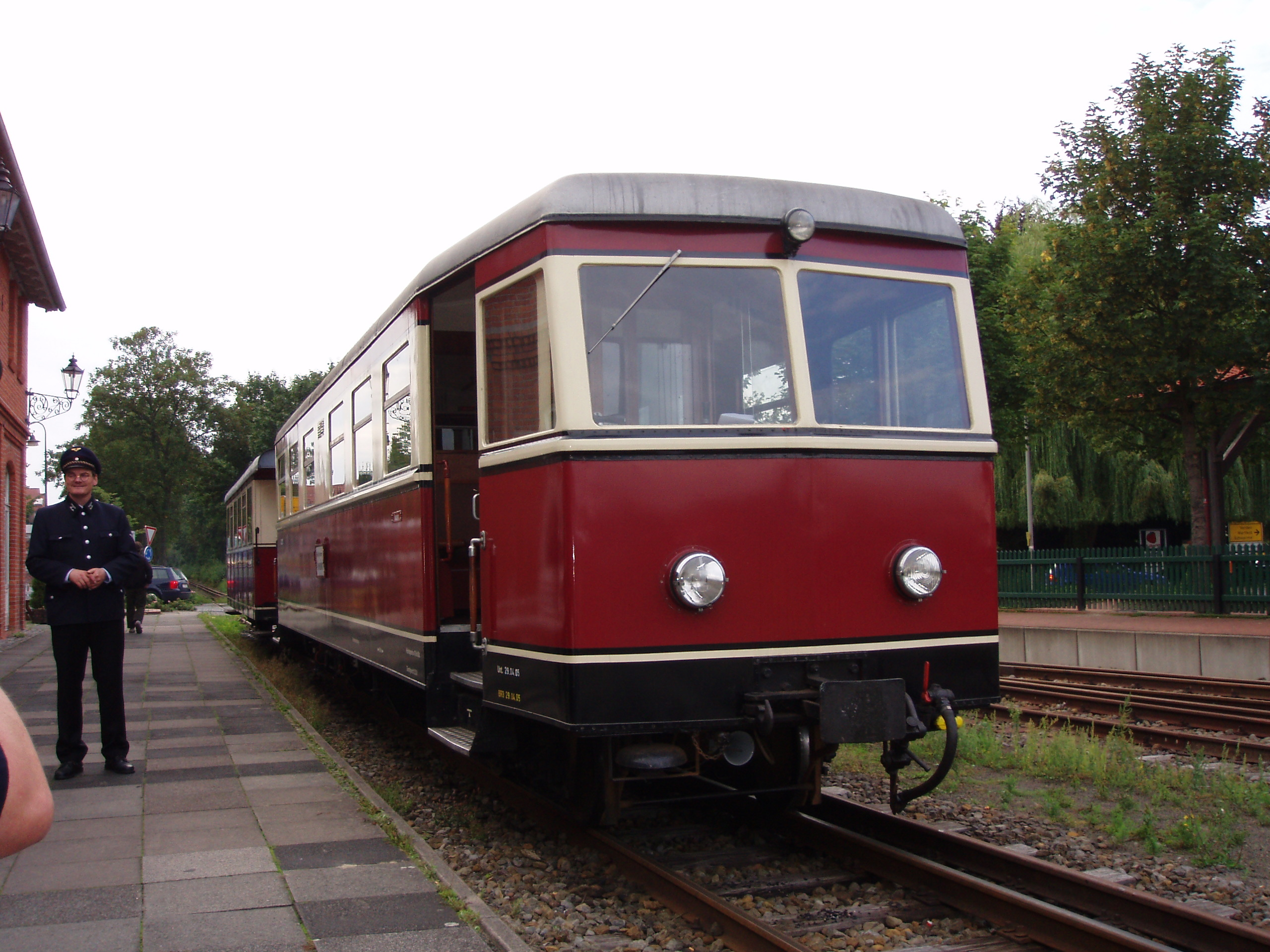 Triebwagen T44 mit Wagen 2 in Bruchhausen-Vilsen. T44 wurde 1950 von Talbot gebaut. C4vT. Als Nr. 1 bei den Euskirchener Kreisbahnen im Einsatz bis 1959, dann als T2 bei der Inselbahn Juist, nach deren Auflösung Übereignung an DEV.